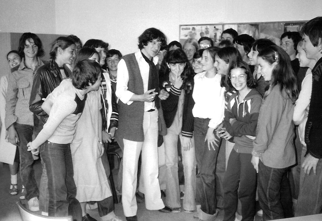 Intervention de René-Louis Baron au Collège André Malraux de Romans-sur-Isère (Drôme). Sujet : Eveil à la créativité.